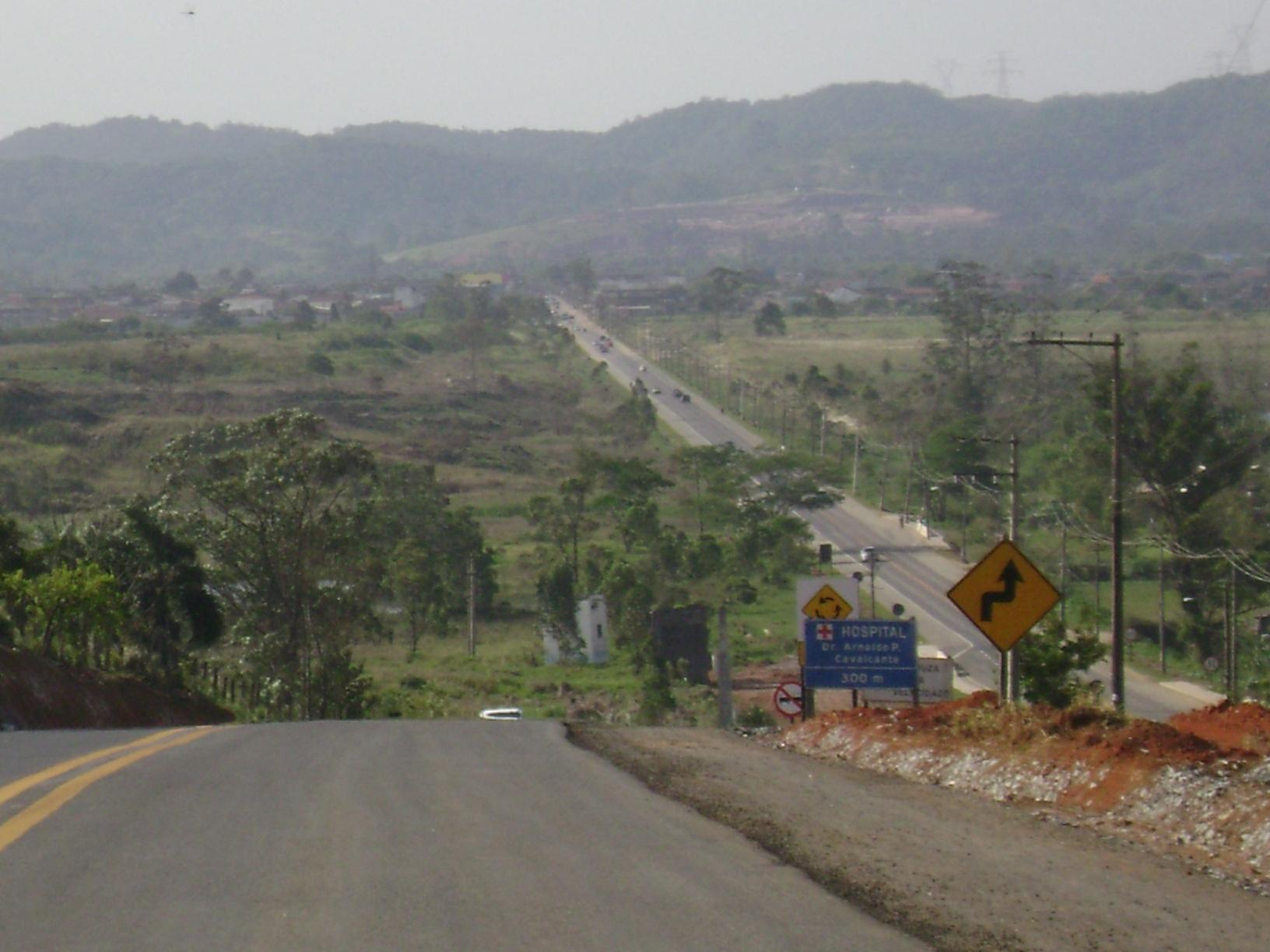 Rodovia Cândido do Rego Chaves (SP-39) no Distrito de Jundiapeba, em Mogi das Cruzes. Foto de 26 de setembro de 2009.